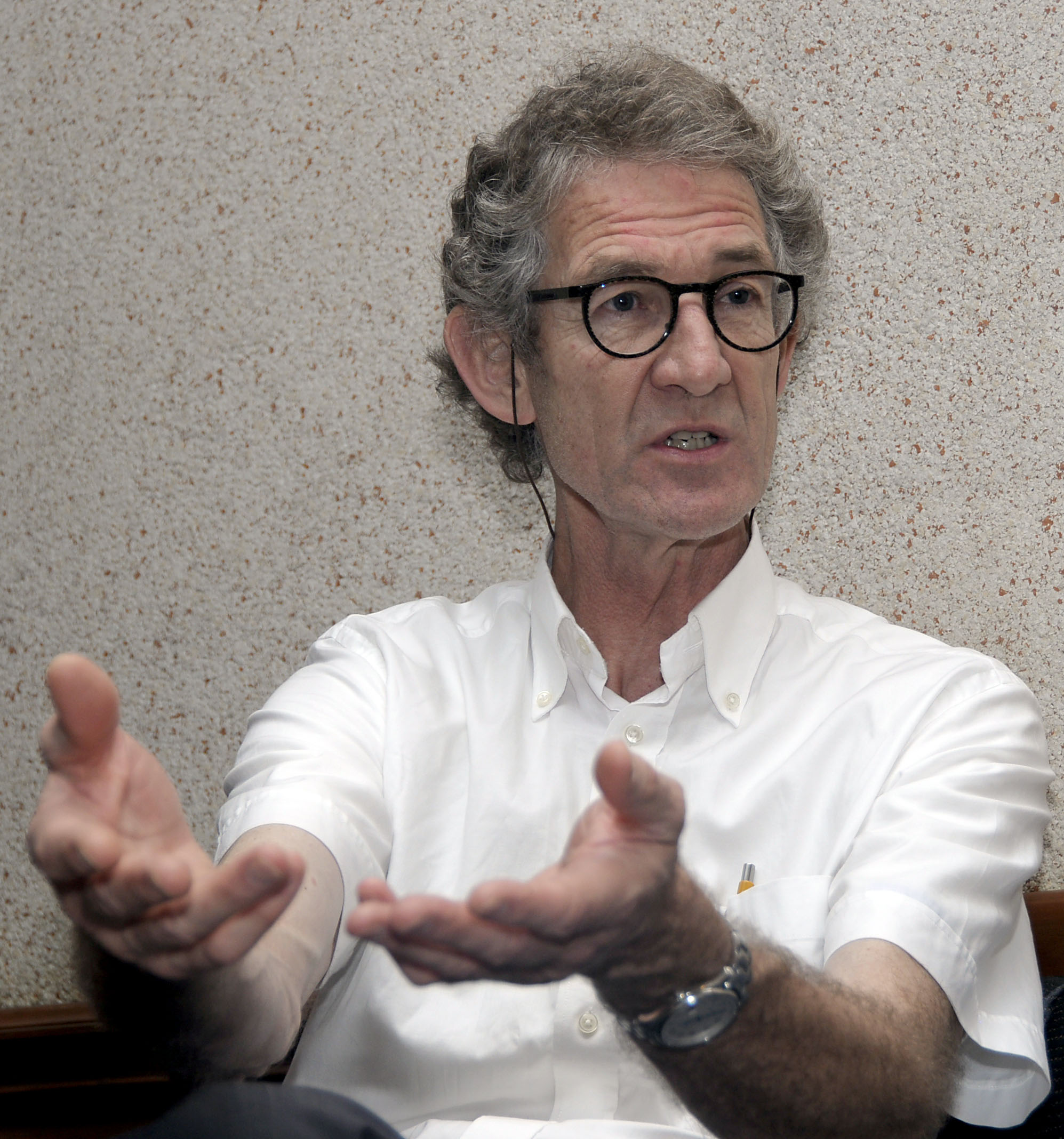 El profesor Bijker